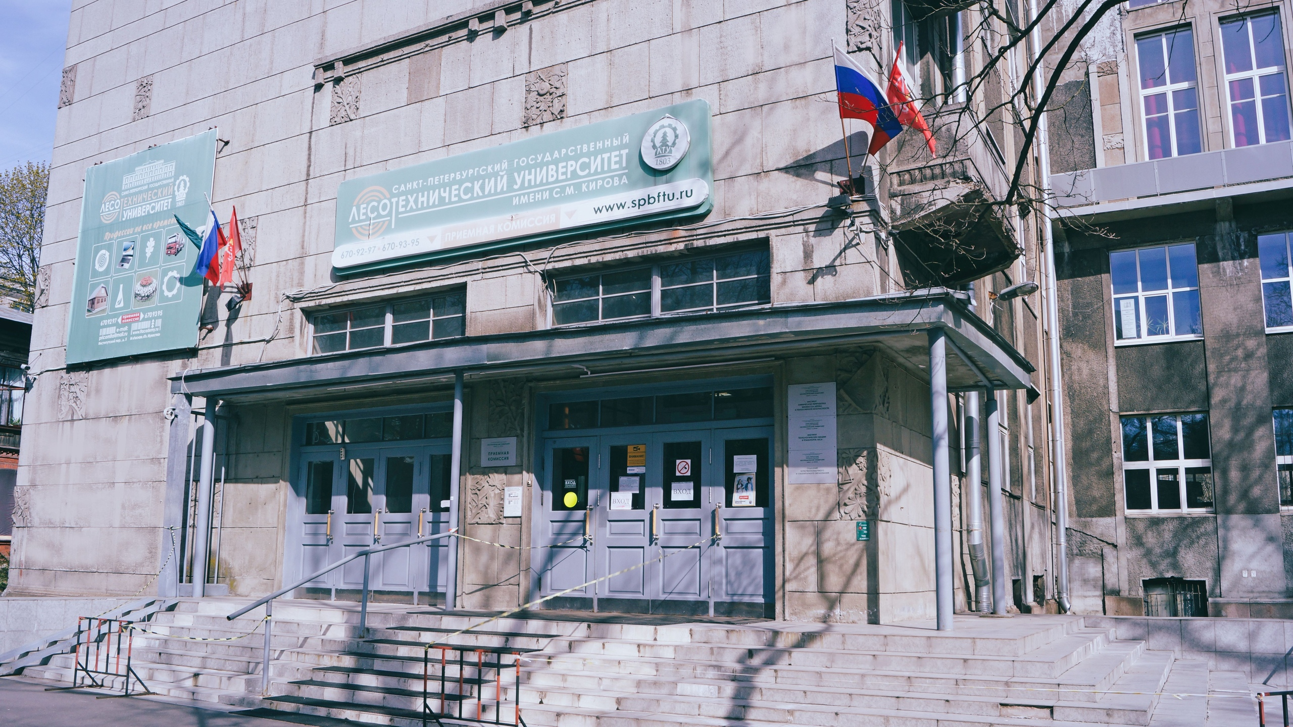 Весна в СПбГЛТУ